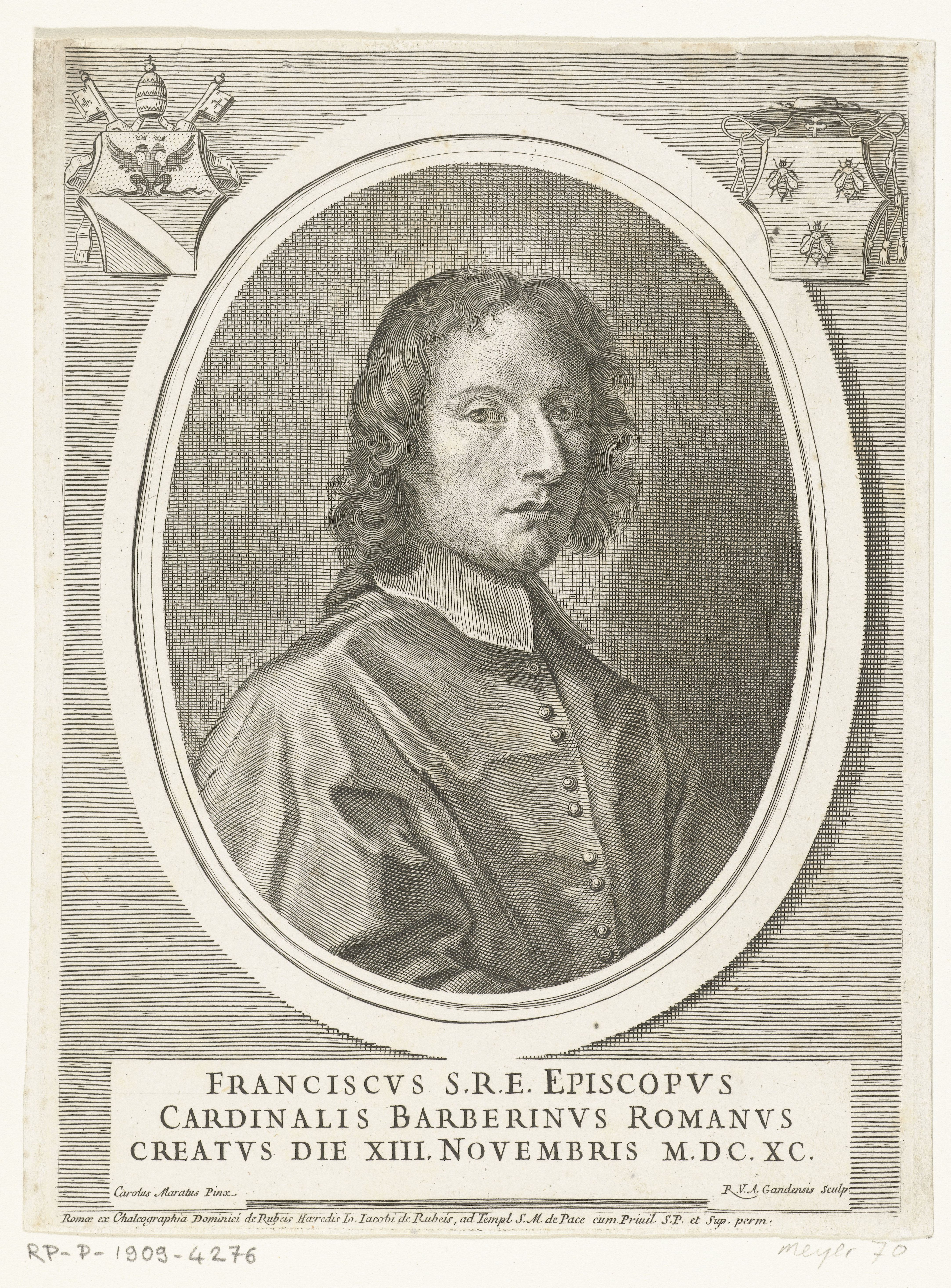 IdentificatieTitel(s): Portret van kardinaal Francesco BarberiniObjecttype: prent Objectnummer: RP-P-1909-4276Catalogusreferentie: Nagler/Meyer 70Opschriften / Merken: verzamelaarsmerk, verso midden, gestempeld: Lugt 2228Omschrijving: Borstbeeld van kardinaal Francesco Barberini op 38 jarige leeftijd, gemaakt ter gelegenheid van zijn inwijding als kardinaal. In de bovenhoeken links het pauselijk wapen van Alexander VIII, en rechts zijn eigen kardinaalswapen. Onder het portret zijn naam en titels.VervaardigingVervaardiger: prentmaker: Robert van Audenaerd (vermeld op object)naar schilderij van: Carlo Maratti (vermeld op object)drukker: Domenico en erven Giovanni Giacomo de'Rossi (vermeld op object)Plaats vervaardiging: RomeDatering: 1690 - 1723Fysieke kenmerken: gravureMateriaal: papier Techniek: graveren (drukprocedé)Afmetingen: plaatrand: h 212 mm × b 155 mmOnderwerpWie: Francesco BarberiniVerwerving en rechtenVerwerving: aankoop 1905Copyright: Publiek domein